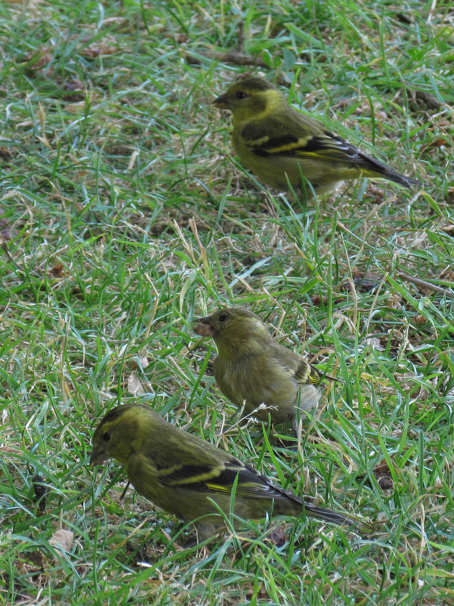 Pajaros